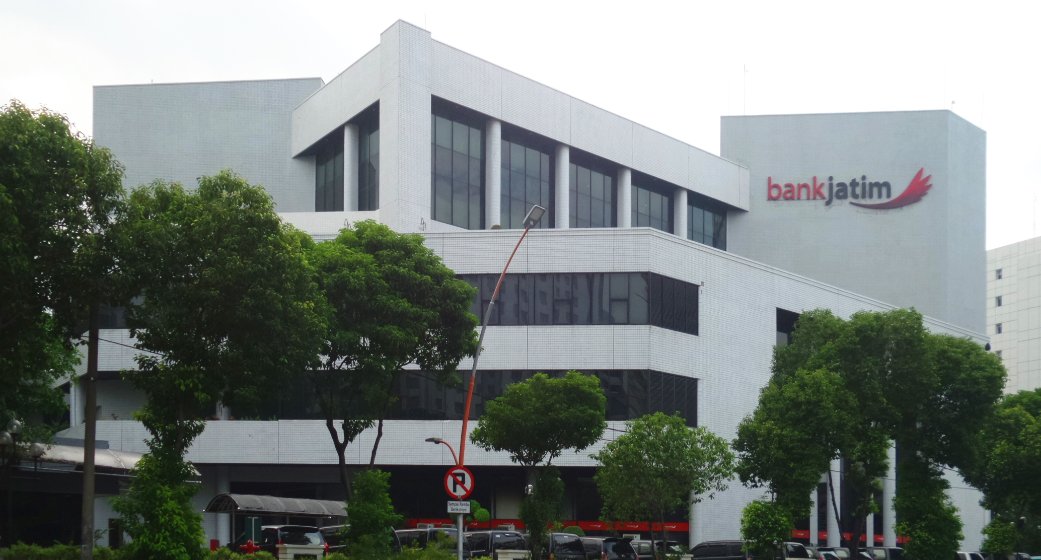 Head office for regional bank Bank Jatim. Looks neat and beautiful despite being a low-rise. Kantor pusat Bank Pembangunan Daerah Jawa TImur. Indah dan bersih padahal gedung ini cuma sebuah low-rise.